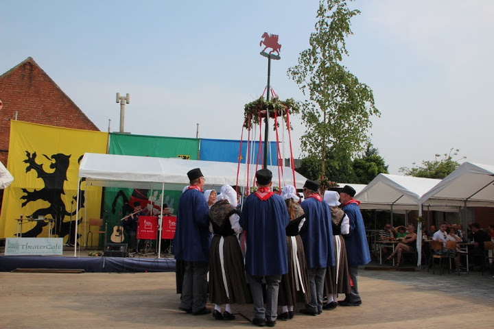 planten van de meiboom